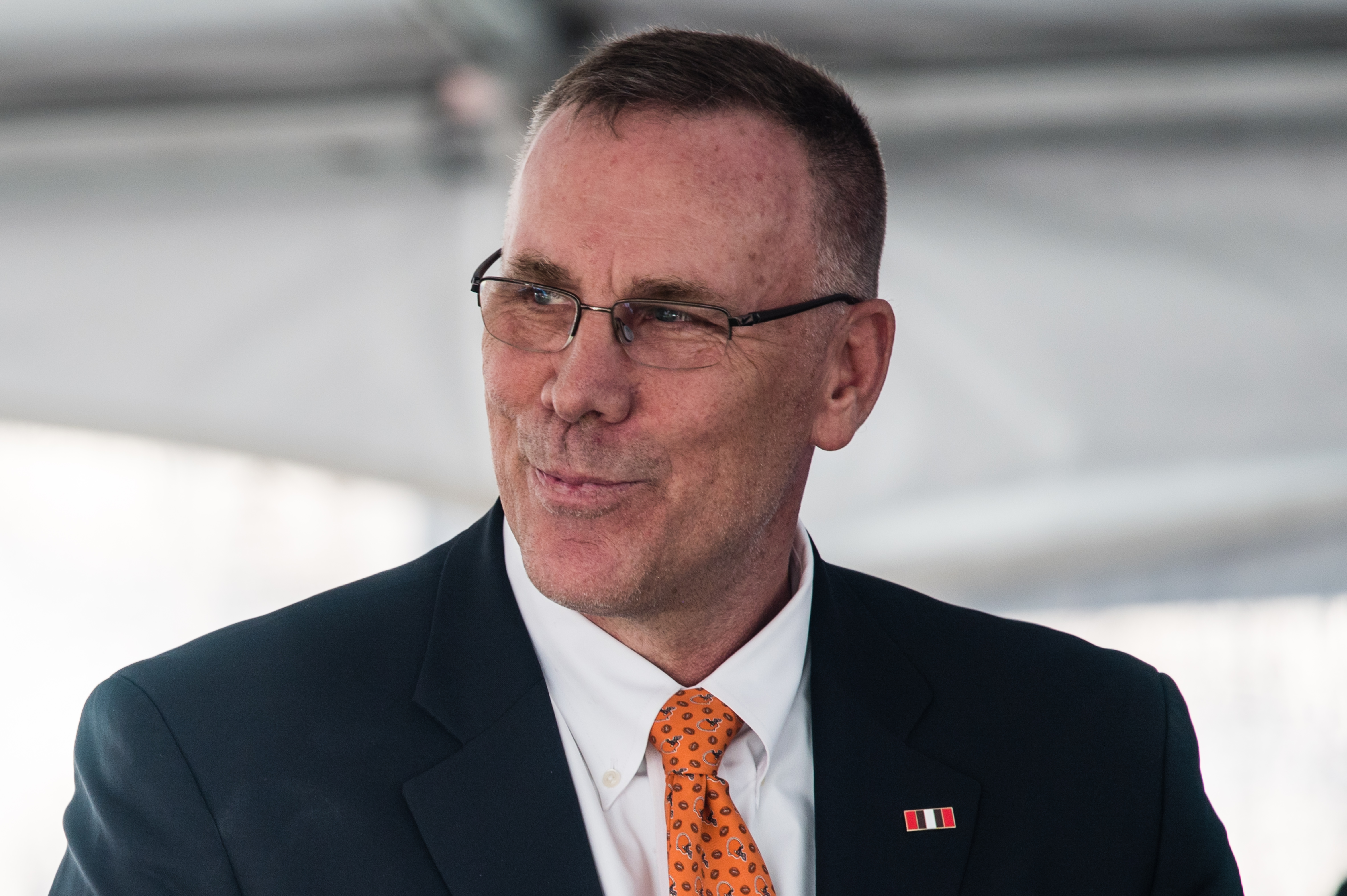 John Dorsey